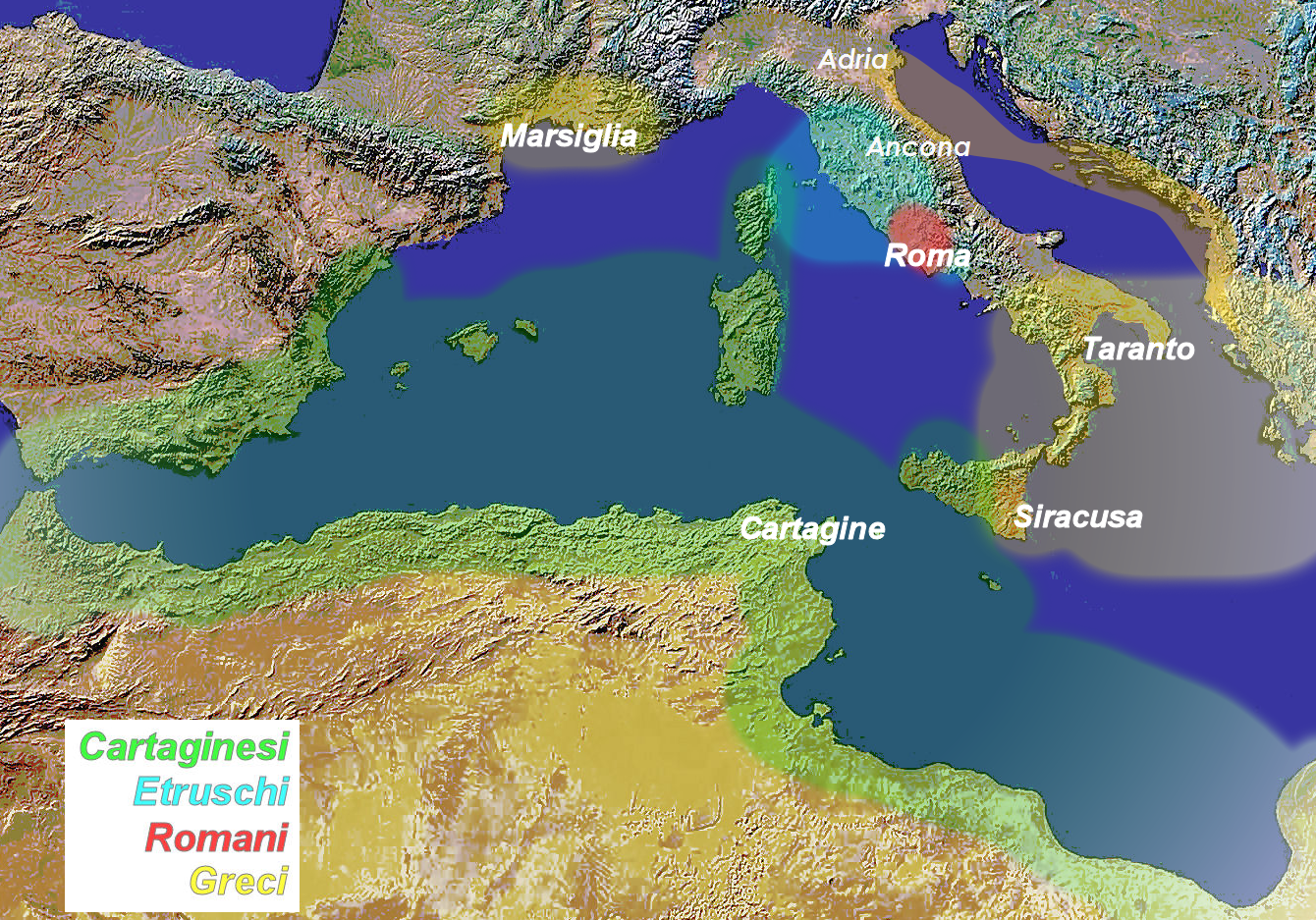 Main areas of influence in West Mediterranean Sea in 348 BC. Principali aree di influenza nel Mediterraneo Occidentale nell'anno 348 aC (Secondo Trattato Roma-Cartagine).